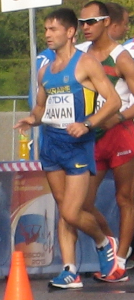 Чемпионат мира по лёгкой атлетике 2013. Ходьба 50 км, мужчины. Пелотон